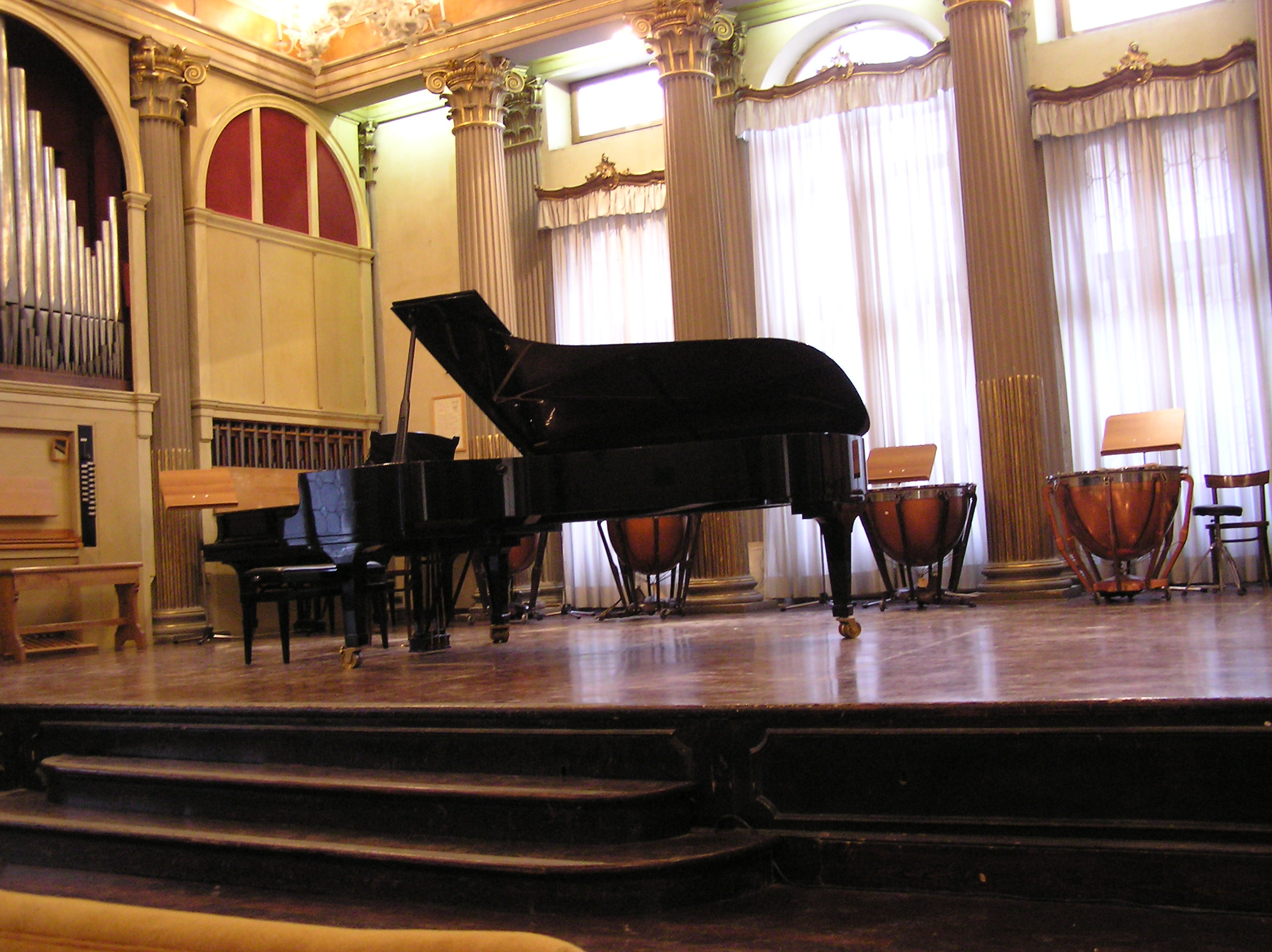 sala conserti conservatorio venezia